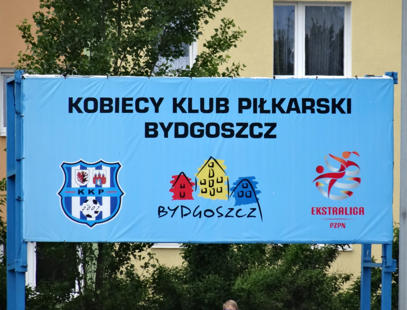 Mecz ekstraligi piłki nożnej kobiet KKP Bydgoszcz - Stilon Gorzów na stadionie przy ul. Słowiańskiej